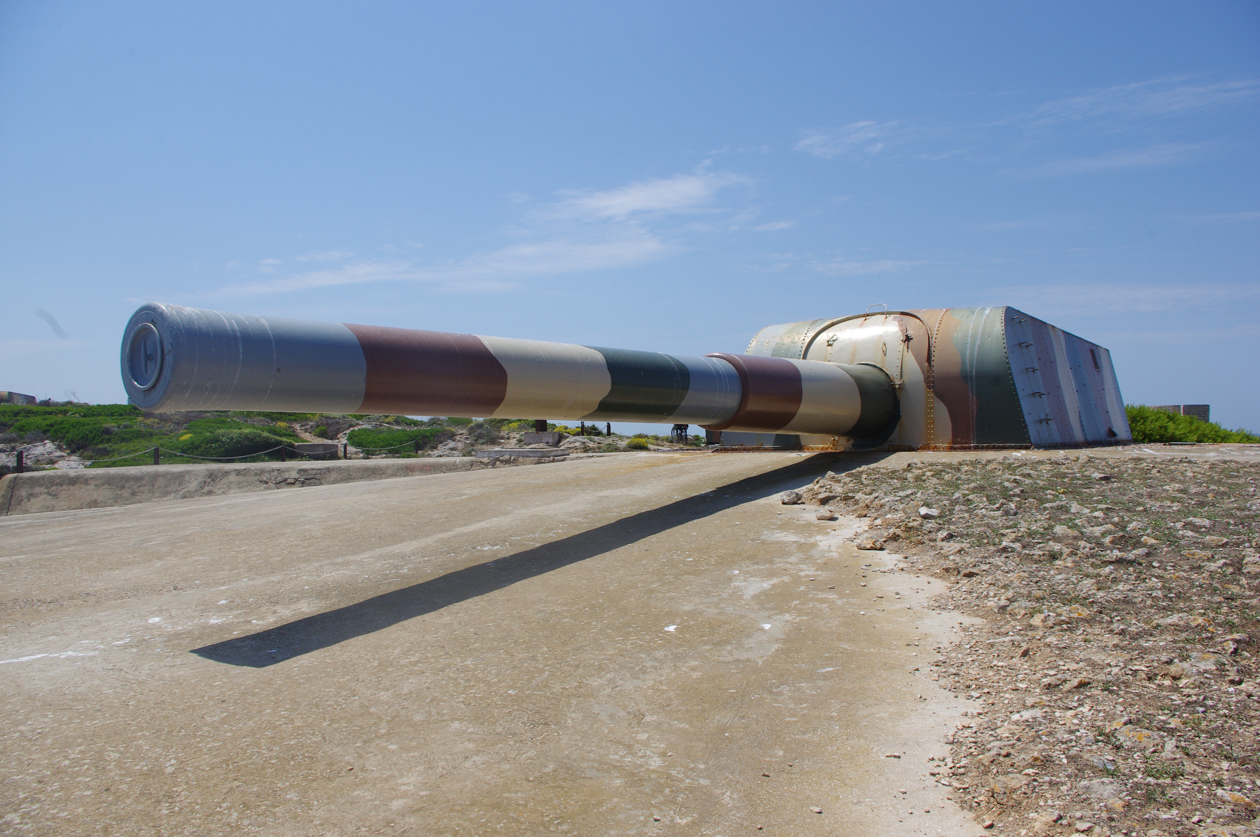 Canó de la bateria Vickers a la fortalesa de la Mola, a Menorca